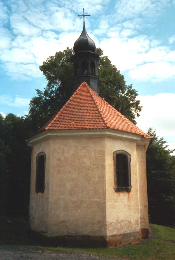 Kapelle unter der Riesenburg